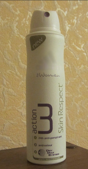 дезодорант